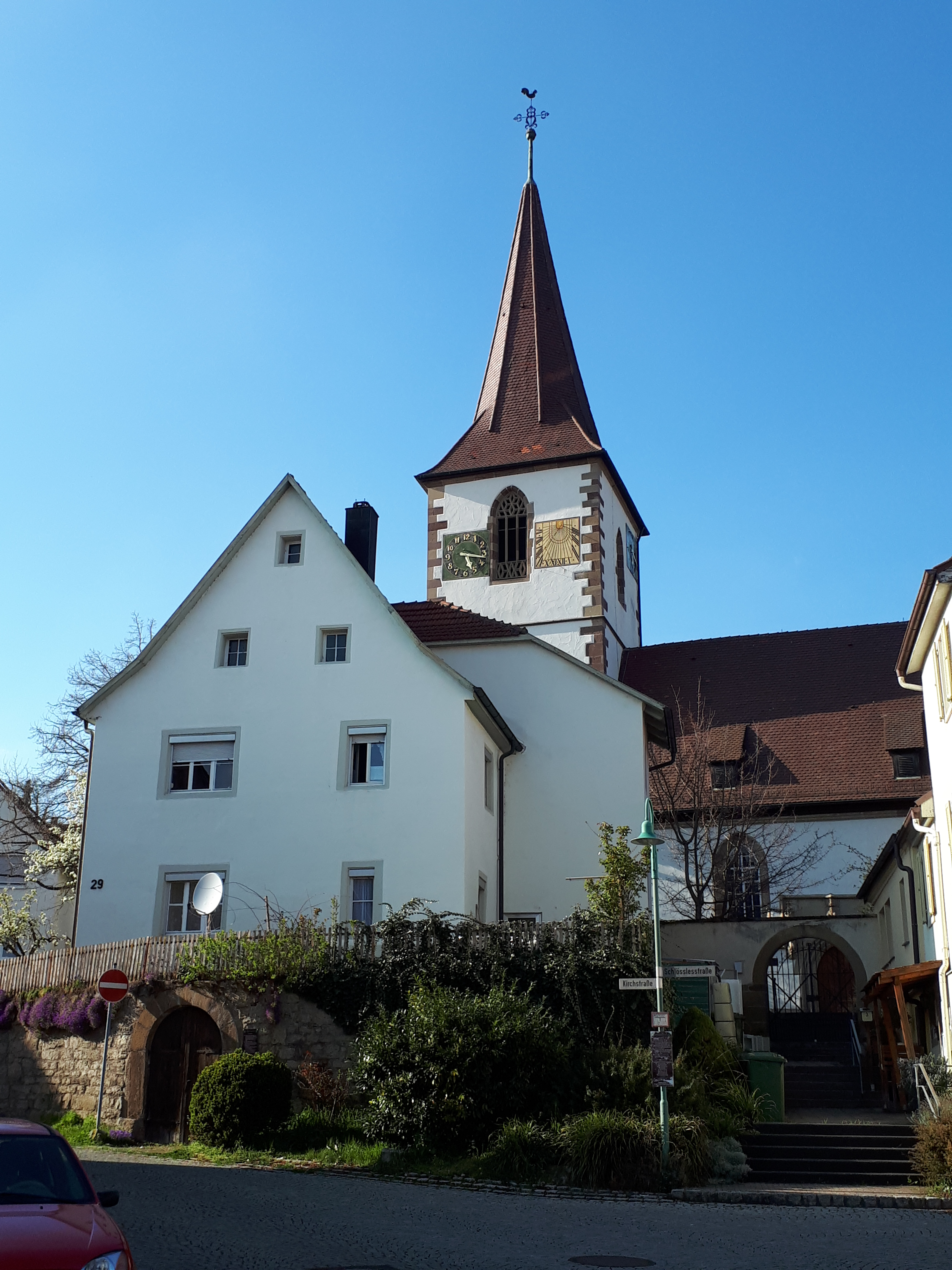 Südansicht der Margaretenkirche in Aldingen; im Vordergrund das Pfaffenhaus